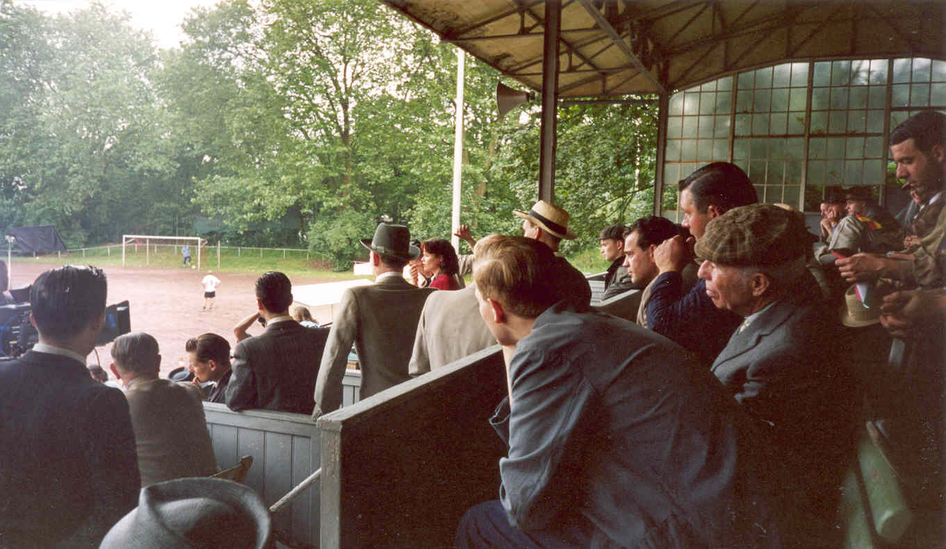 Dreharbeiten für den Film "Das Wunder von Bern"